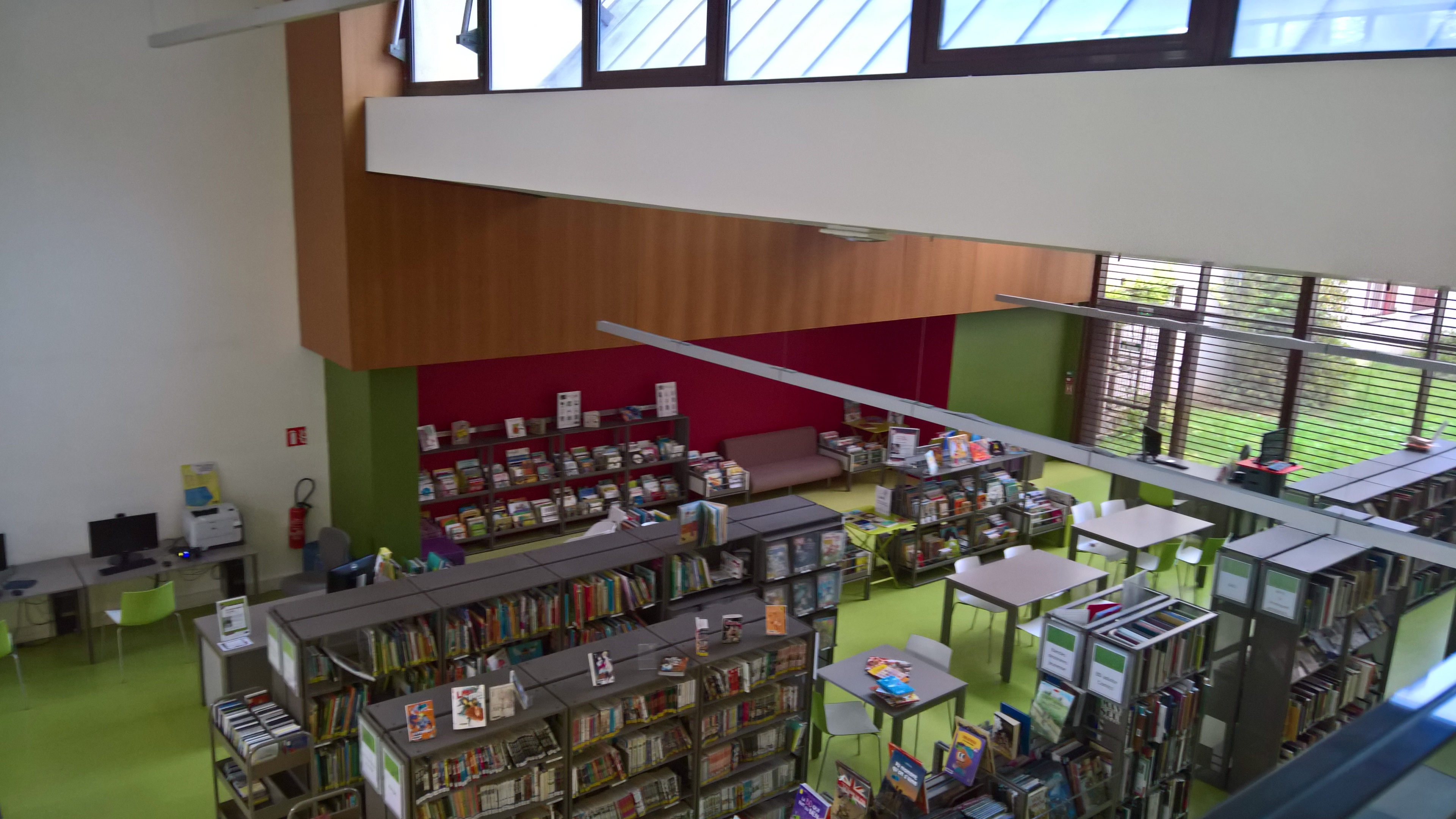 LA PLAINE-SAINT-DENIS (Saint-Denis) : Intérieur de la médiathèque Don Quichotte (120 avenue du Président-Wilson), du Réseau des médiathèques de Plaine Commune